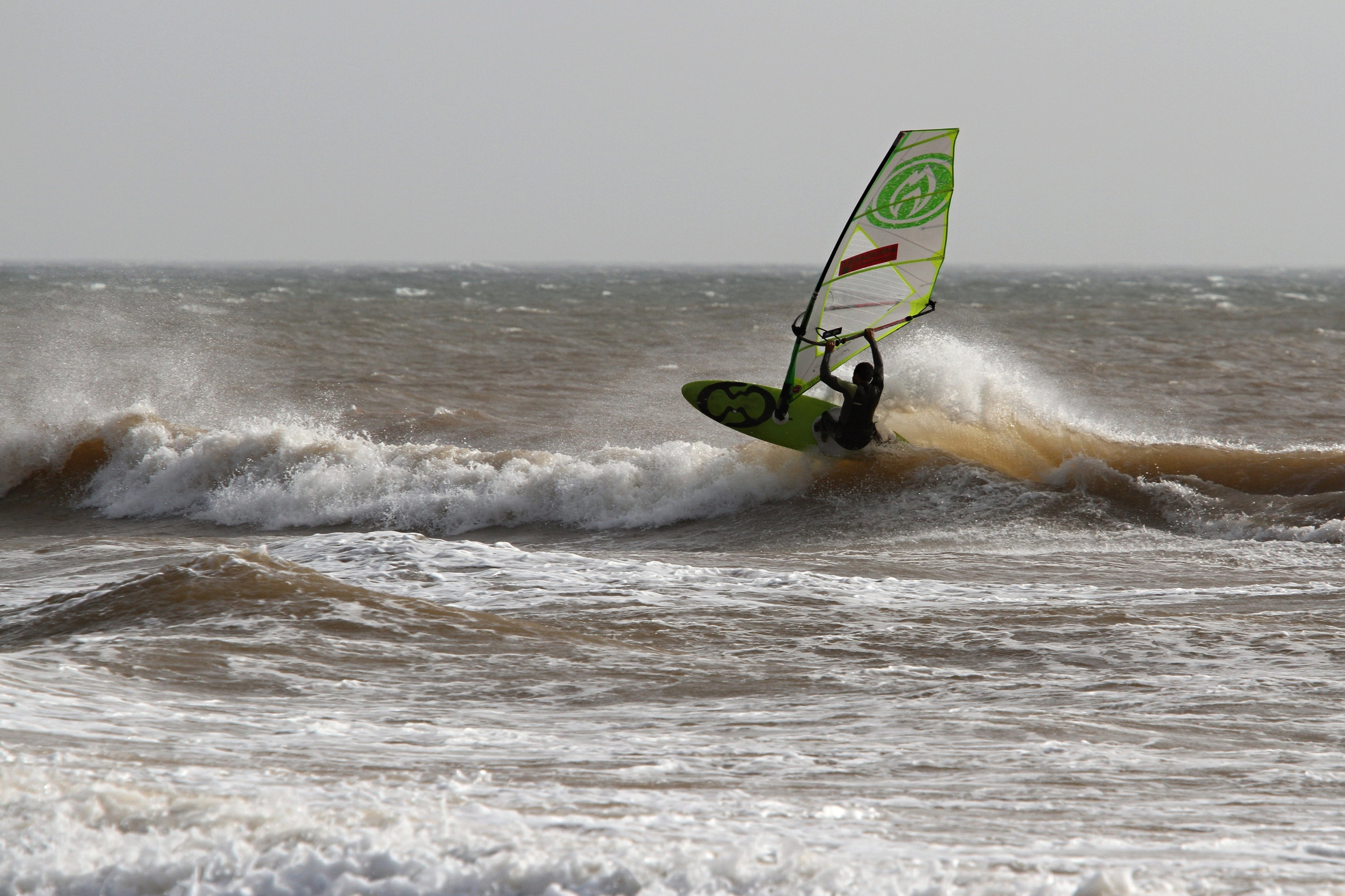 Moulay uno de los mejores sitios para practicar windsurf